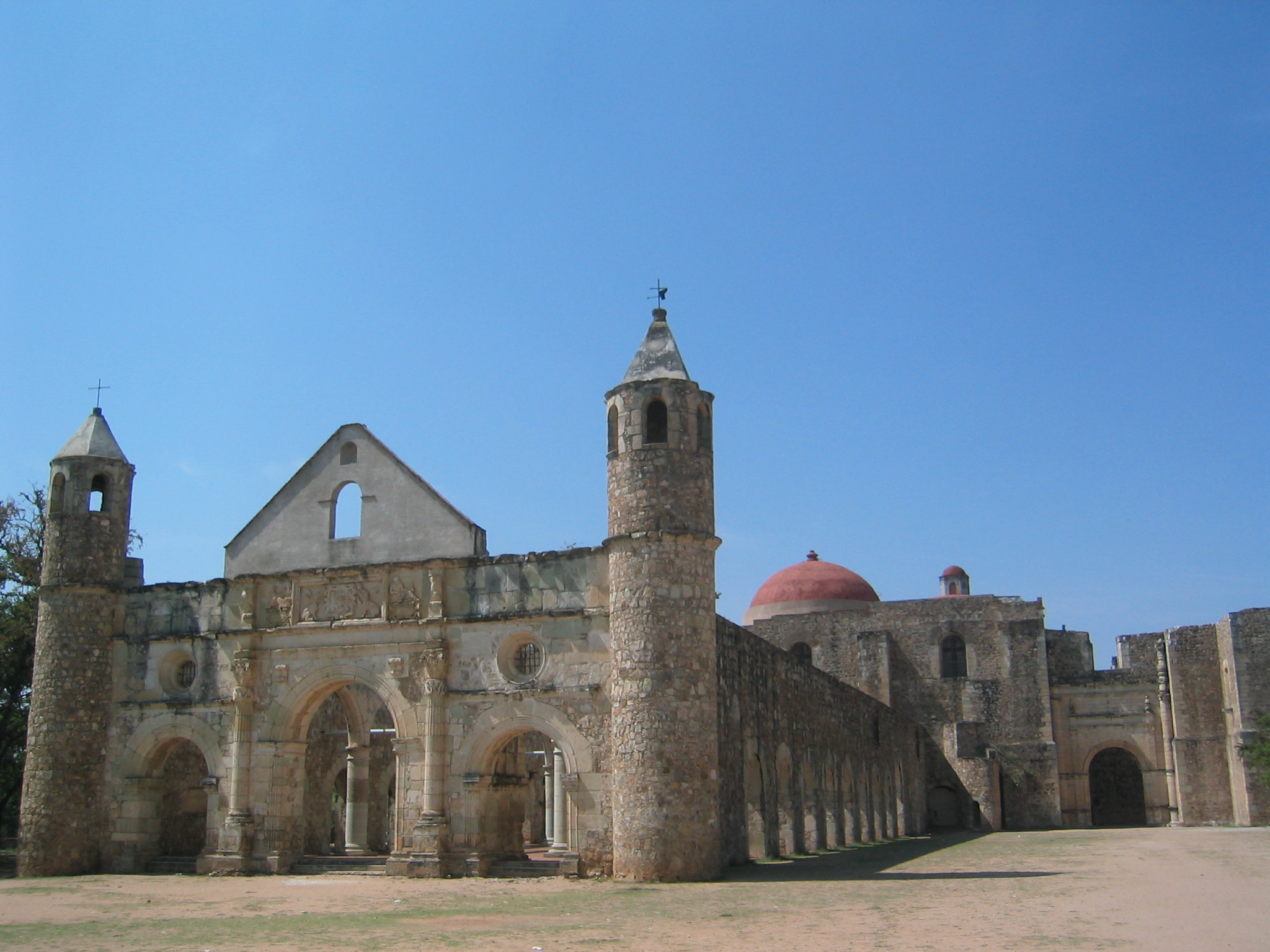 Convento de Santiago Apóstol, Cuilapam